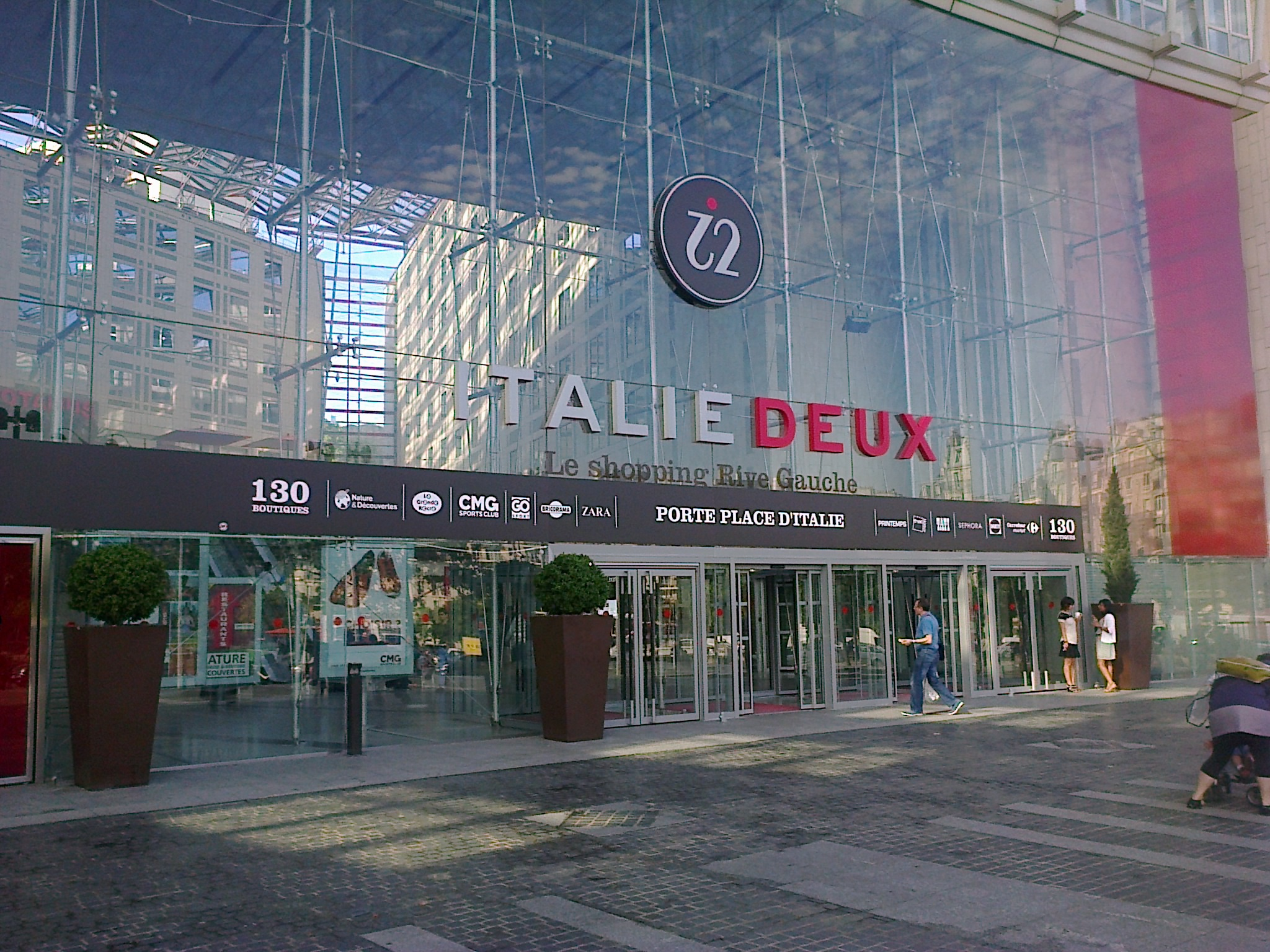 Entrée du centre commercial Italie Deux